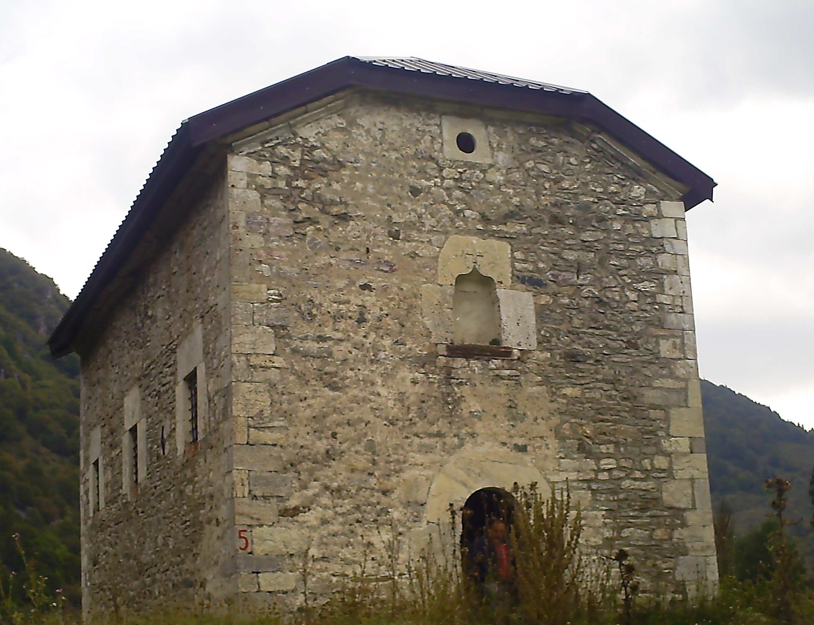 Црква Св.Варвара с.Жужње Маврово